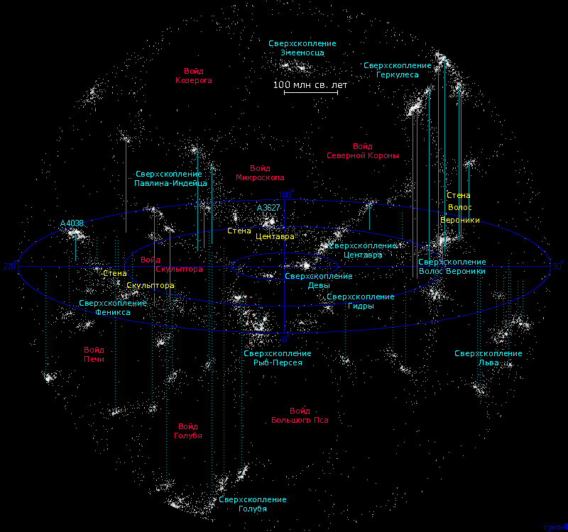 Карта войдов, сверхскоплений и стен на расстоянии до 500 млн. св. лет от Млечного Пути